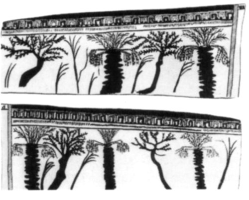 Disegno della tomba V di anfushi, alessandri d'egitto, 1874